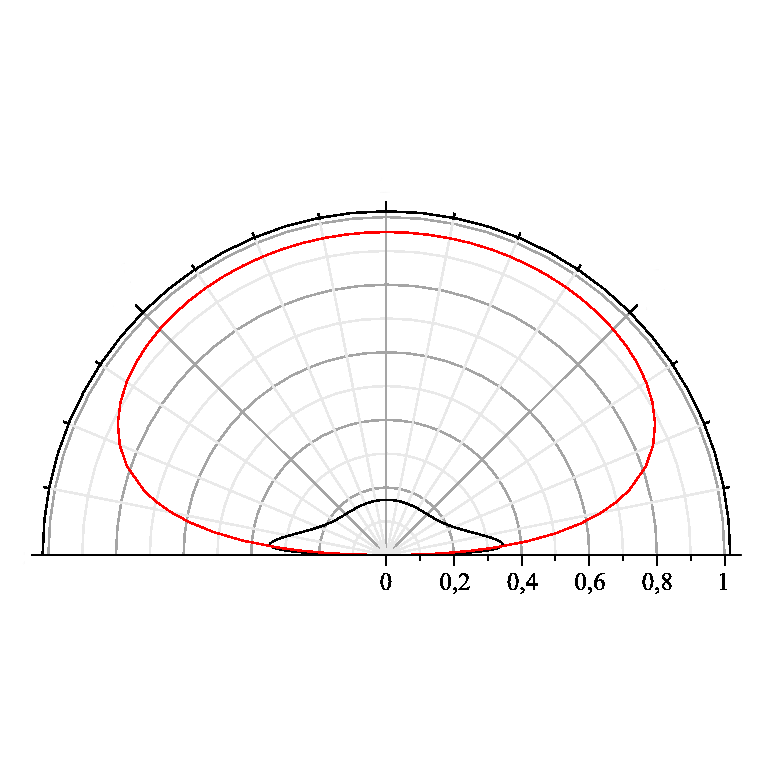 Emissivités d'un métal (noir) et d'un diélectrique (rouge)